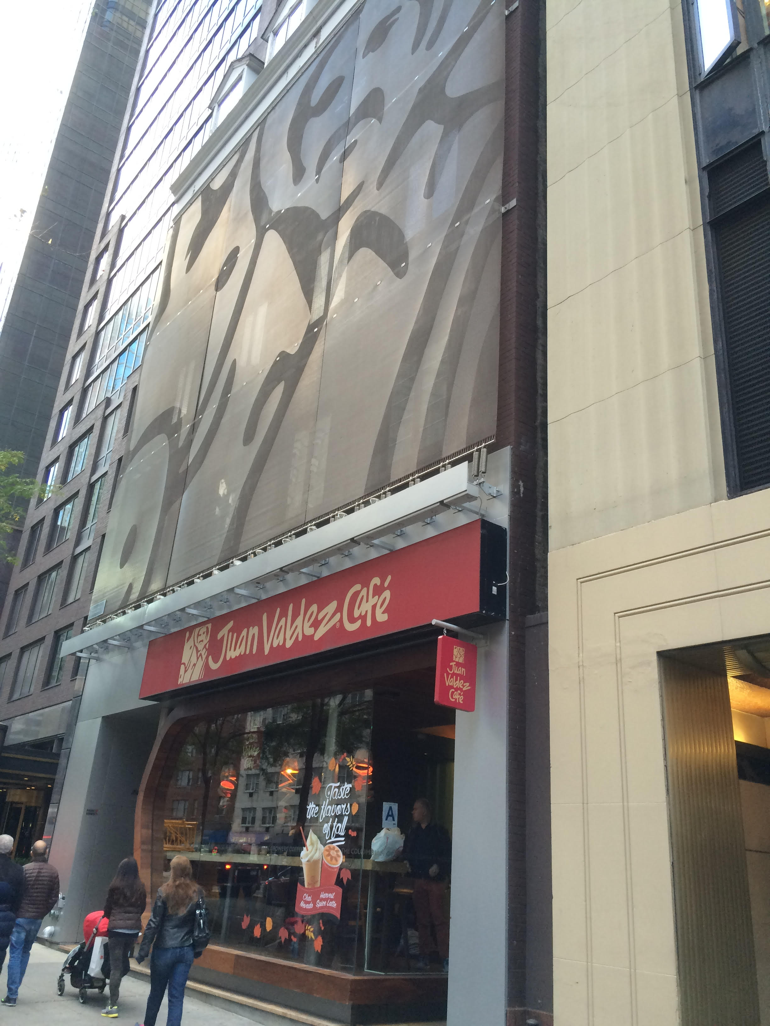 Juan Valdez NYC branch at 140 E 57th St, 695 Lexington Ave, New York